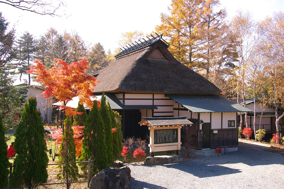 蓼科高原「無芸荘」小津安二郎の旧別荘、記念館。長野県茅野市